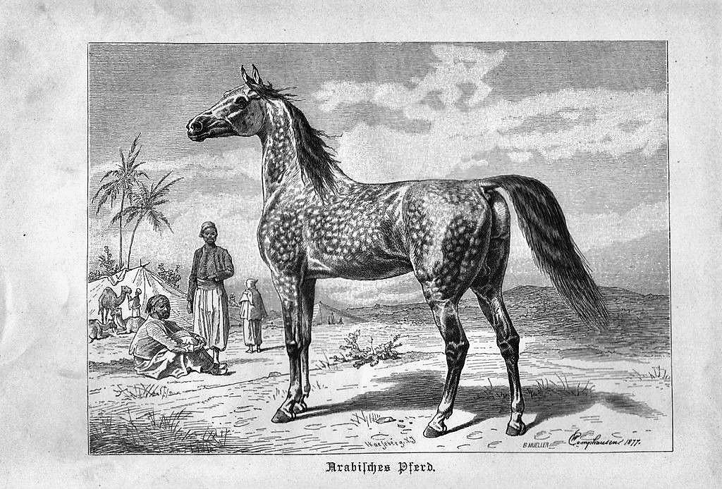 Stich von 1891 ARABISCHES PFERD PFERDE Araber